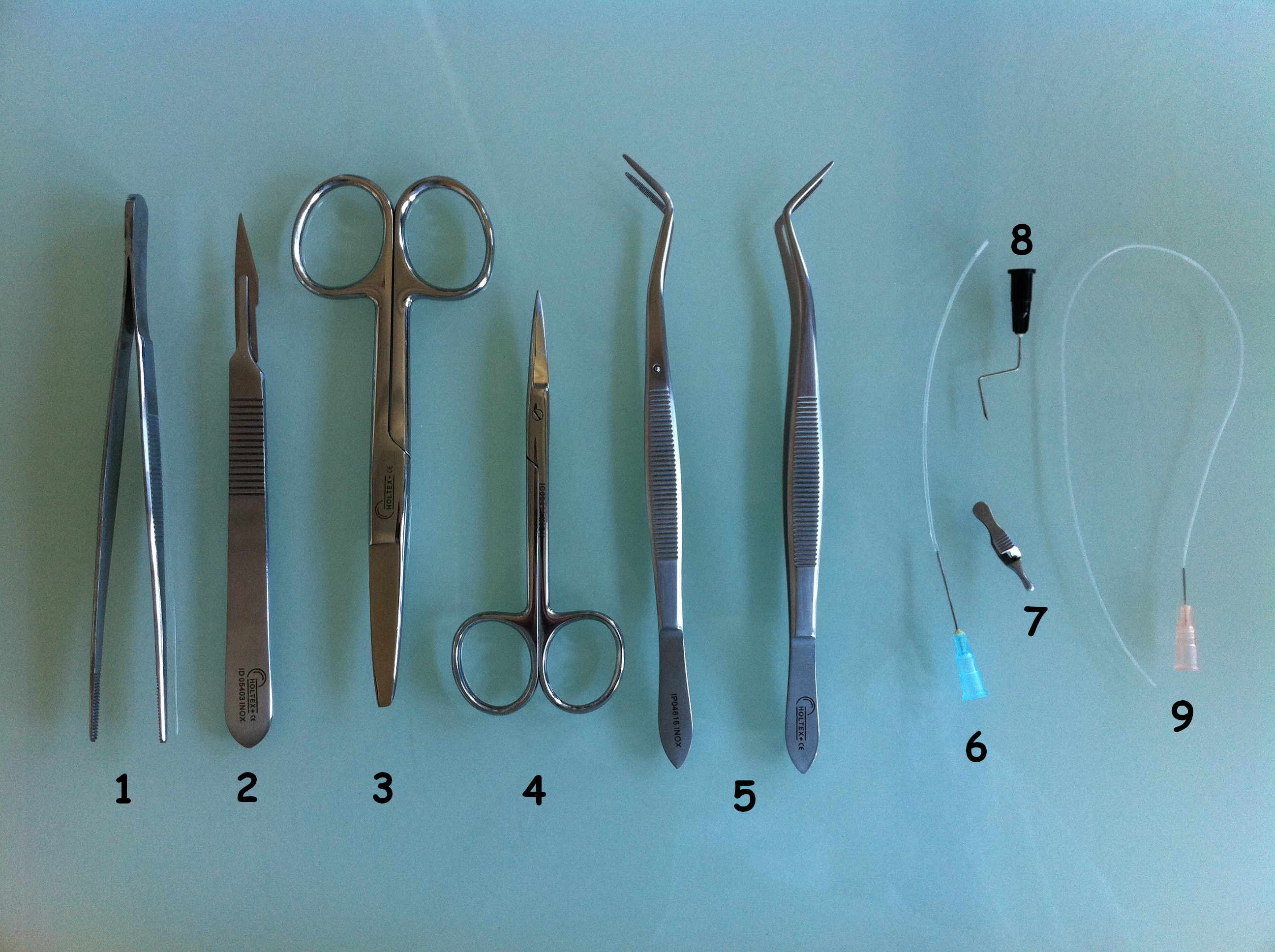 Matériel necéssaire pour faire une canulation.